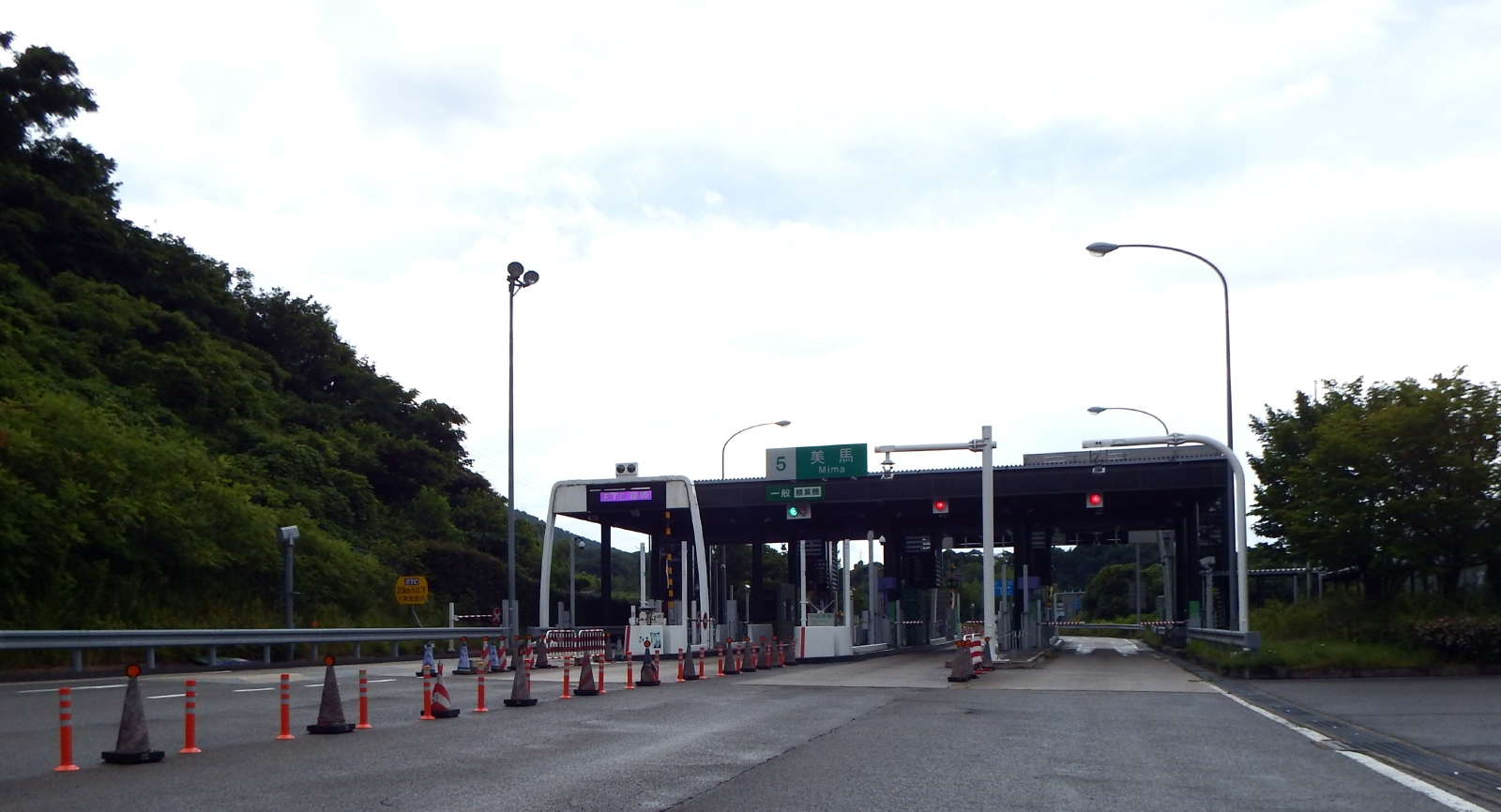 美馬インターチェンジ出口